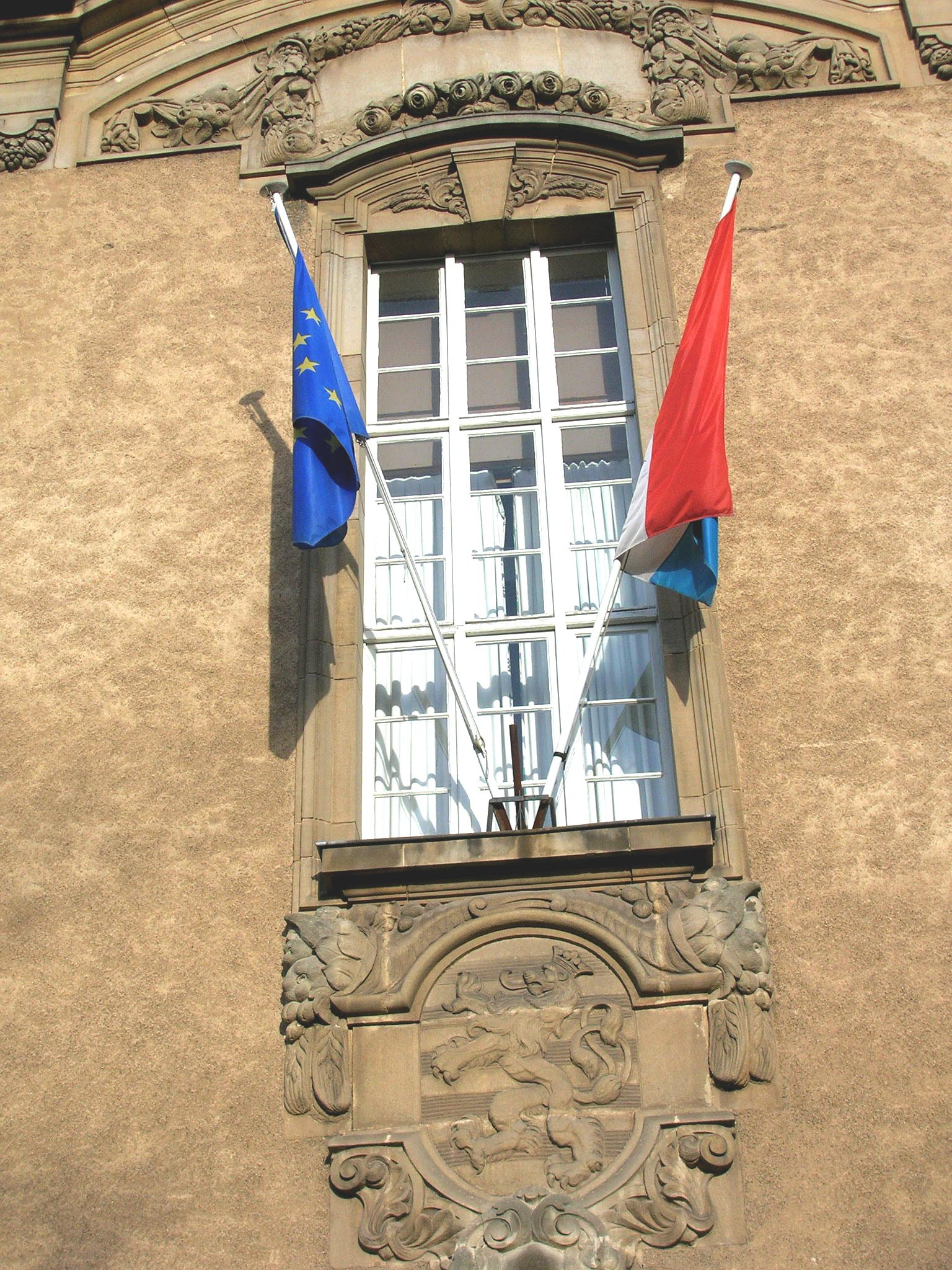 Lëtzebuerg läit an Europa.